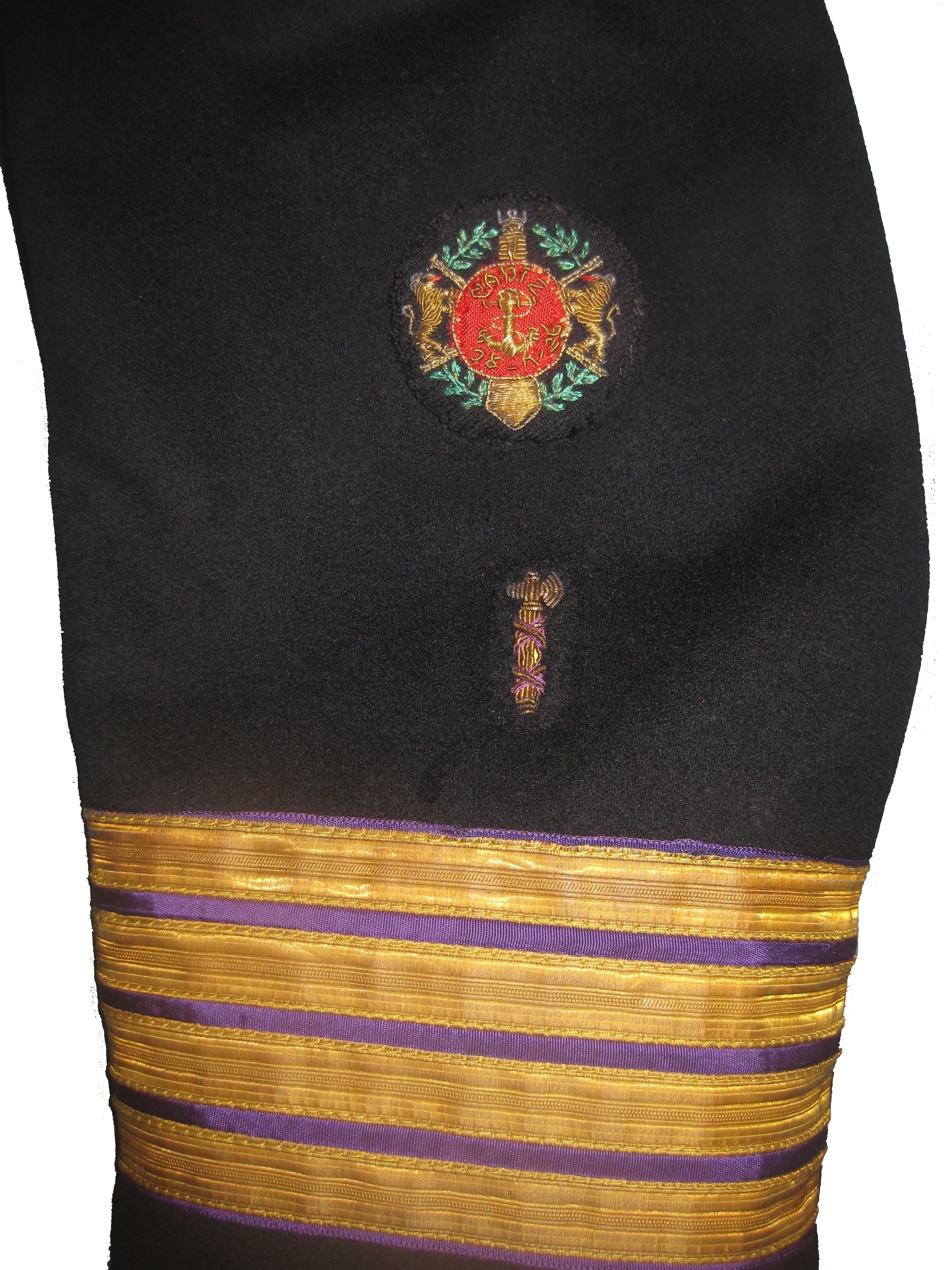 Bocamanga de Coronel Auditor de la Armada con el distintivo de Medalla Militar Colectiva.